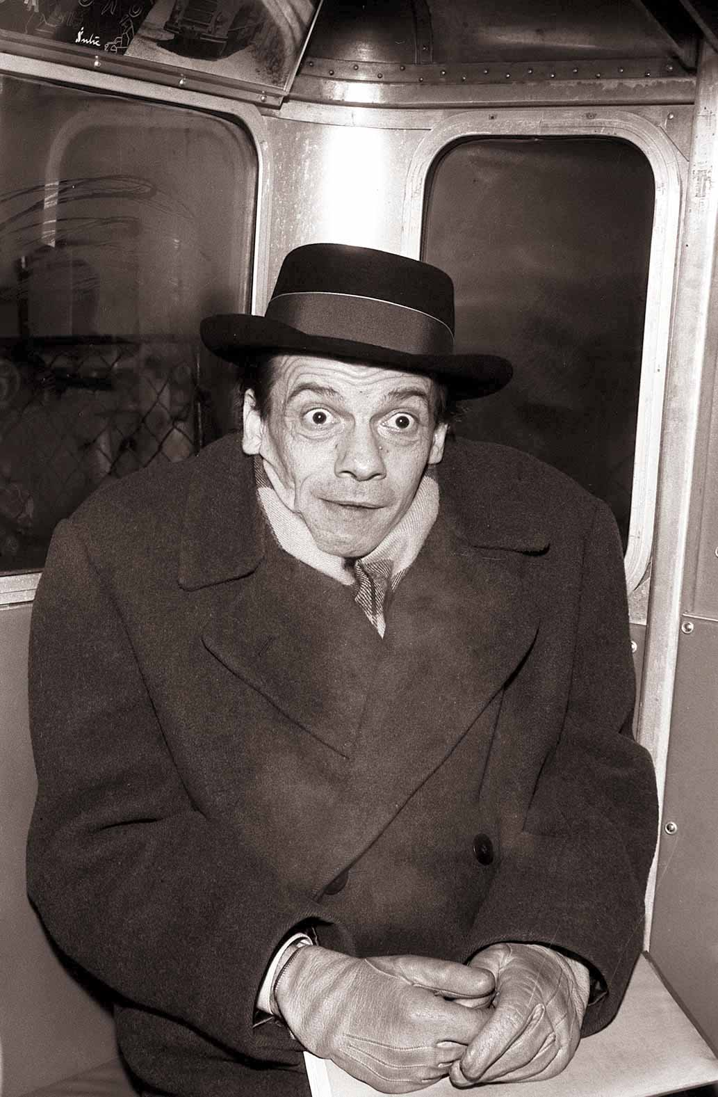 Humorist Ježek se je dopoldne peljal prvič s pohorsko vzpenjačo in koristil življenjsko brezplačno vozovnico.